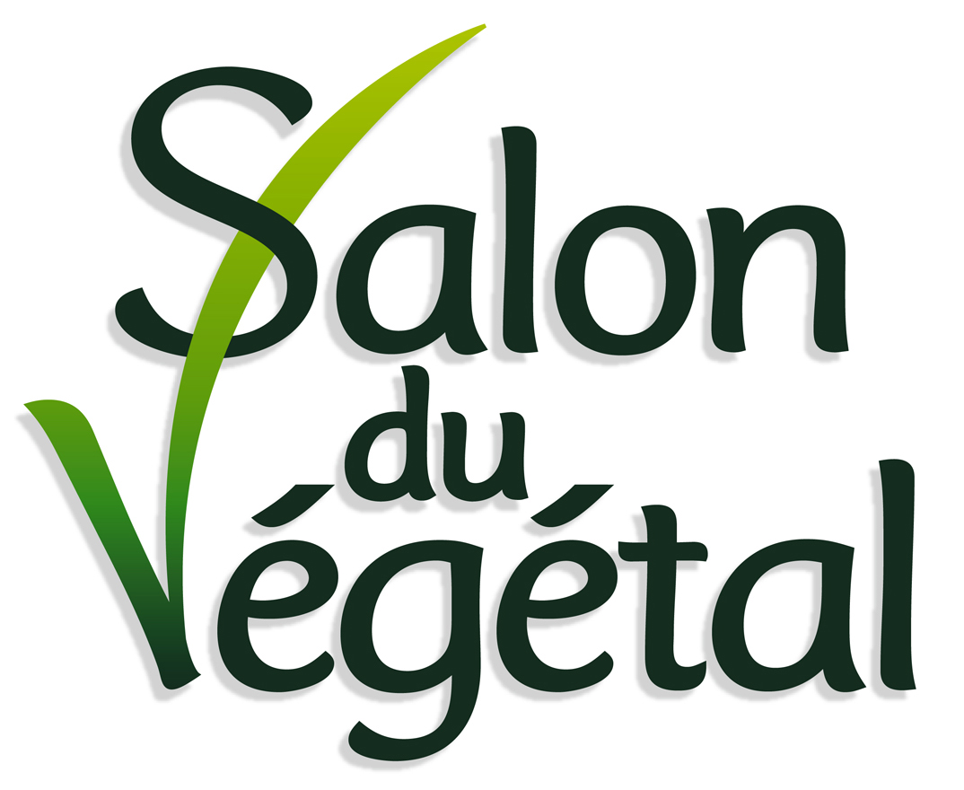 Le grand rassemblement professionnel de la filière horticole en France